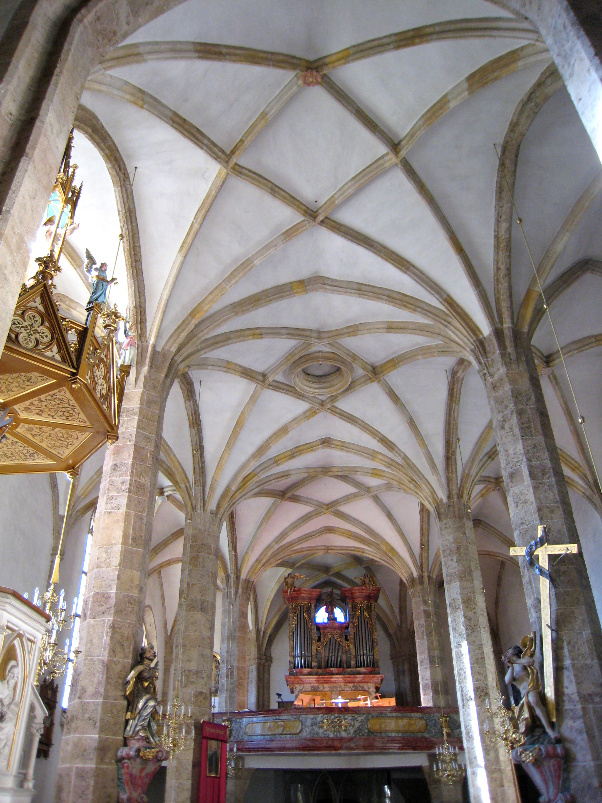 Kath. Pfarrkirche hl. Ägydius und ehem. Friedhof